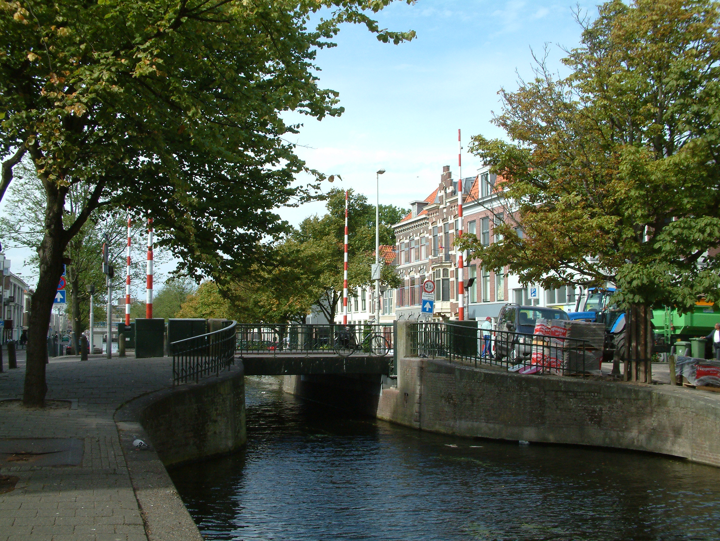 Brug in Den Haag